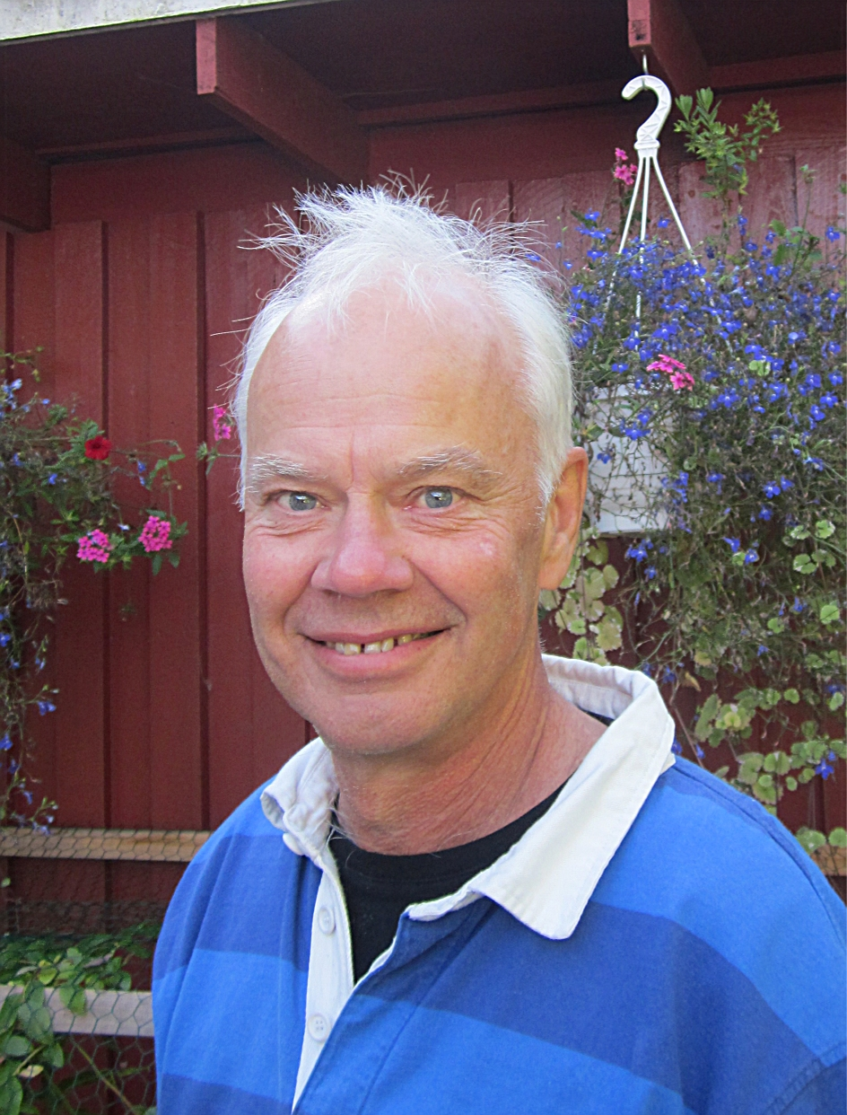 Jan Gissberg, svensk tecknare, animatör och filmregisör. Jan Gissberg, Swedish cartoonist, animator and film director.